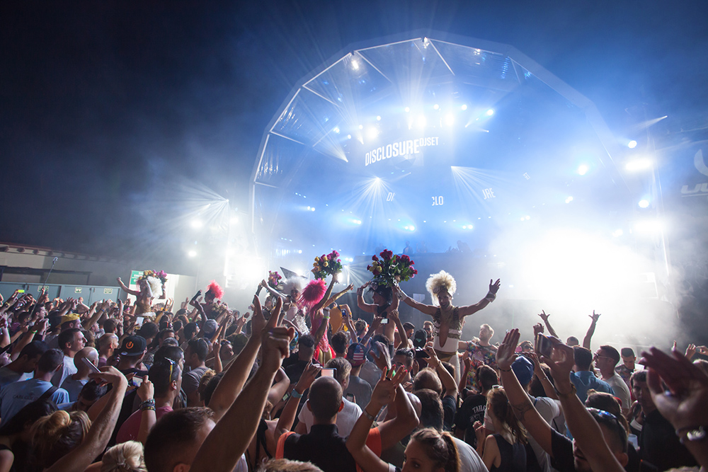 Space Ibiza Anniversary